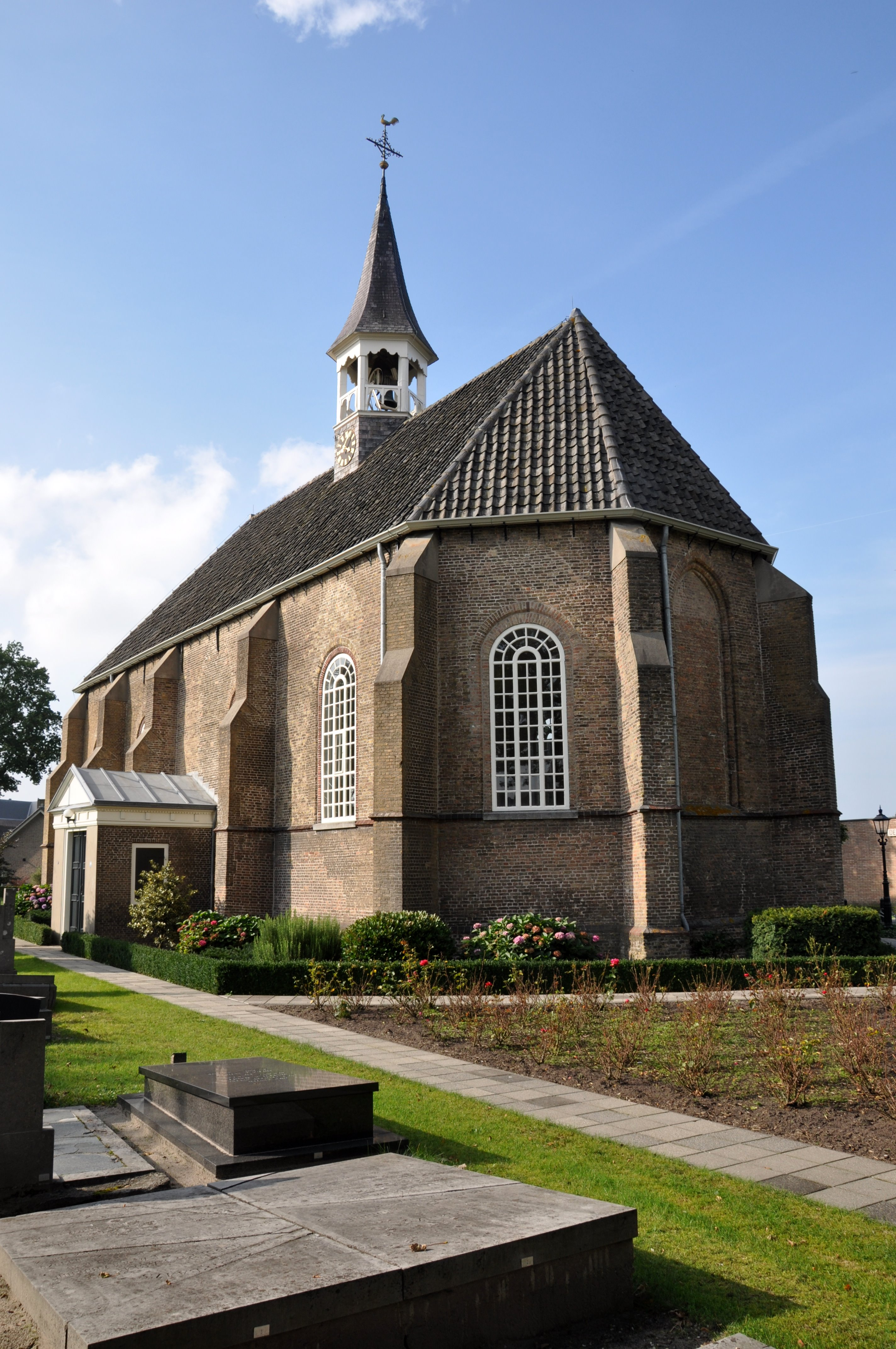 Ned. Hervormde Kerk Made klik op 'Monument'